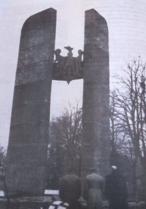 Dzierżoniów - Pomnik w 1977r.